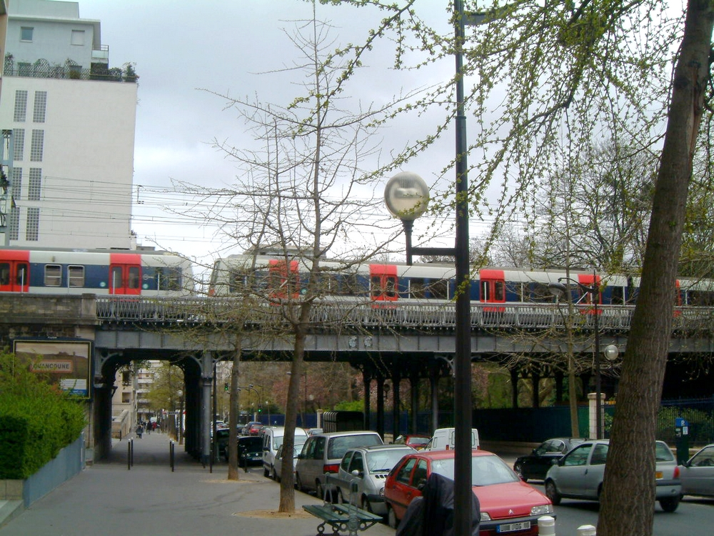 Paris 14e, avenue Reille. La ligne B du RER traverse le quartier du Nord au Sud.